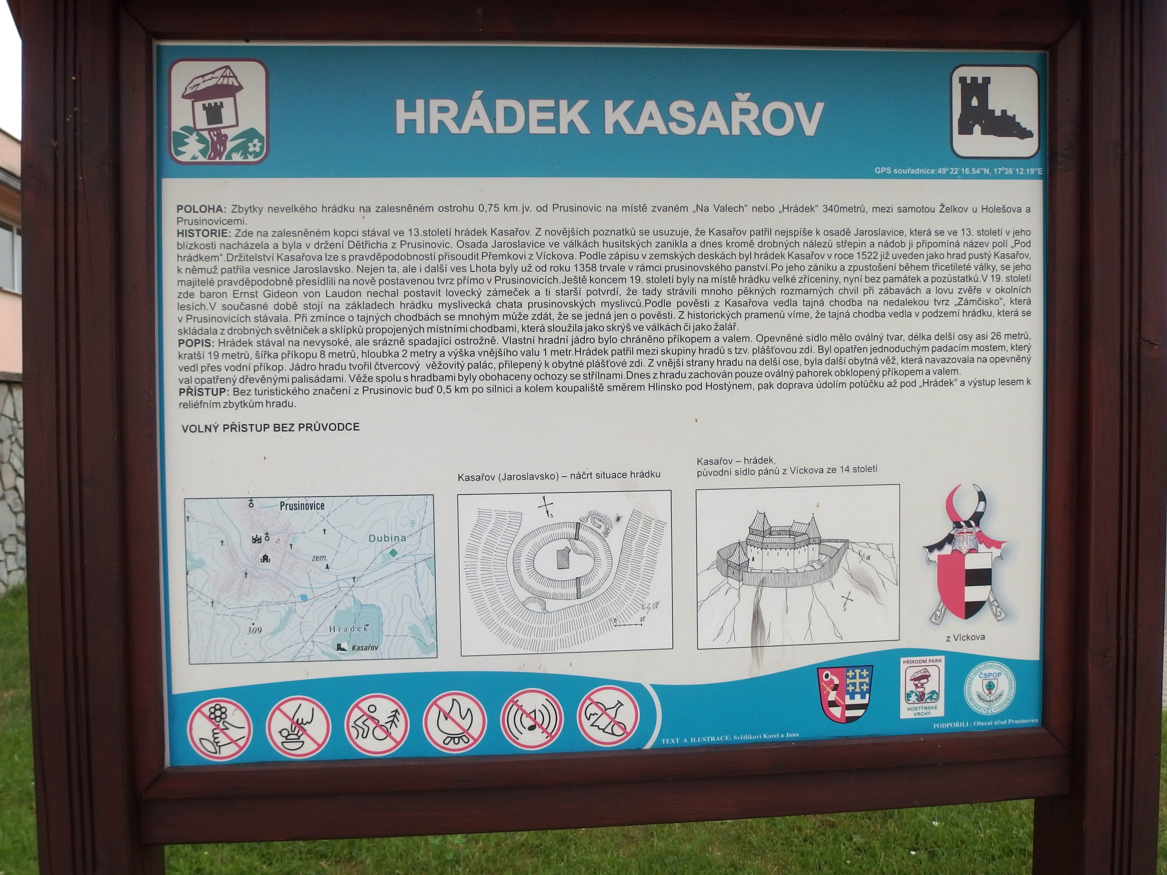 Hrádek Kasařov, Prusinovice.